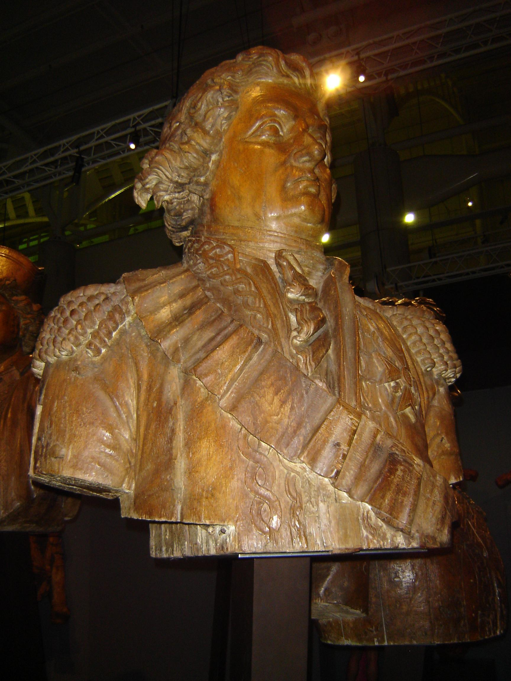 sculpture de l'amiral de Suffren